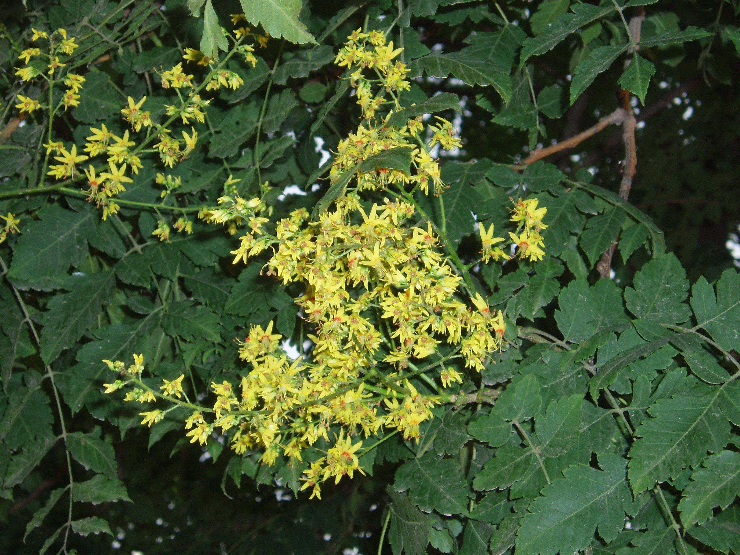 Goldenrain tree